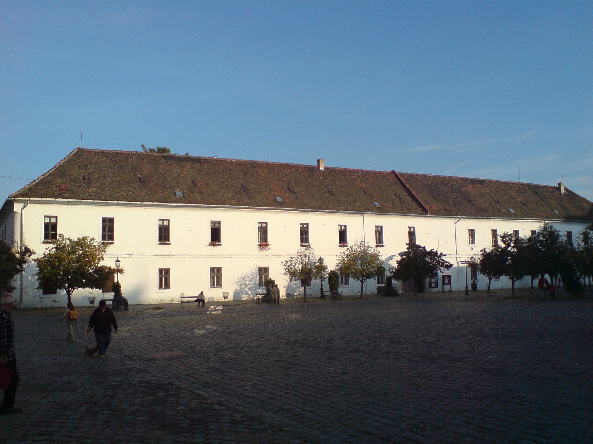 Schloss Zichy, Obuda, Wirtschaftsbau